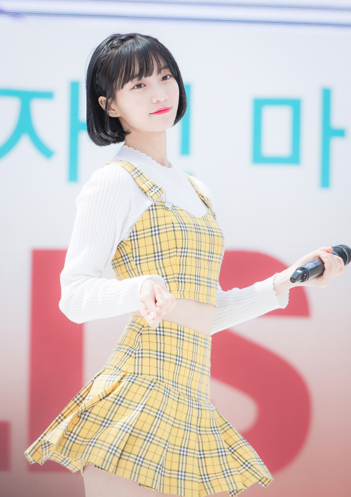 180407 불스레이스 축하공연 오마이걸 아린 비니